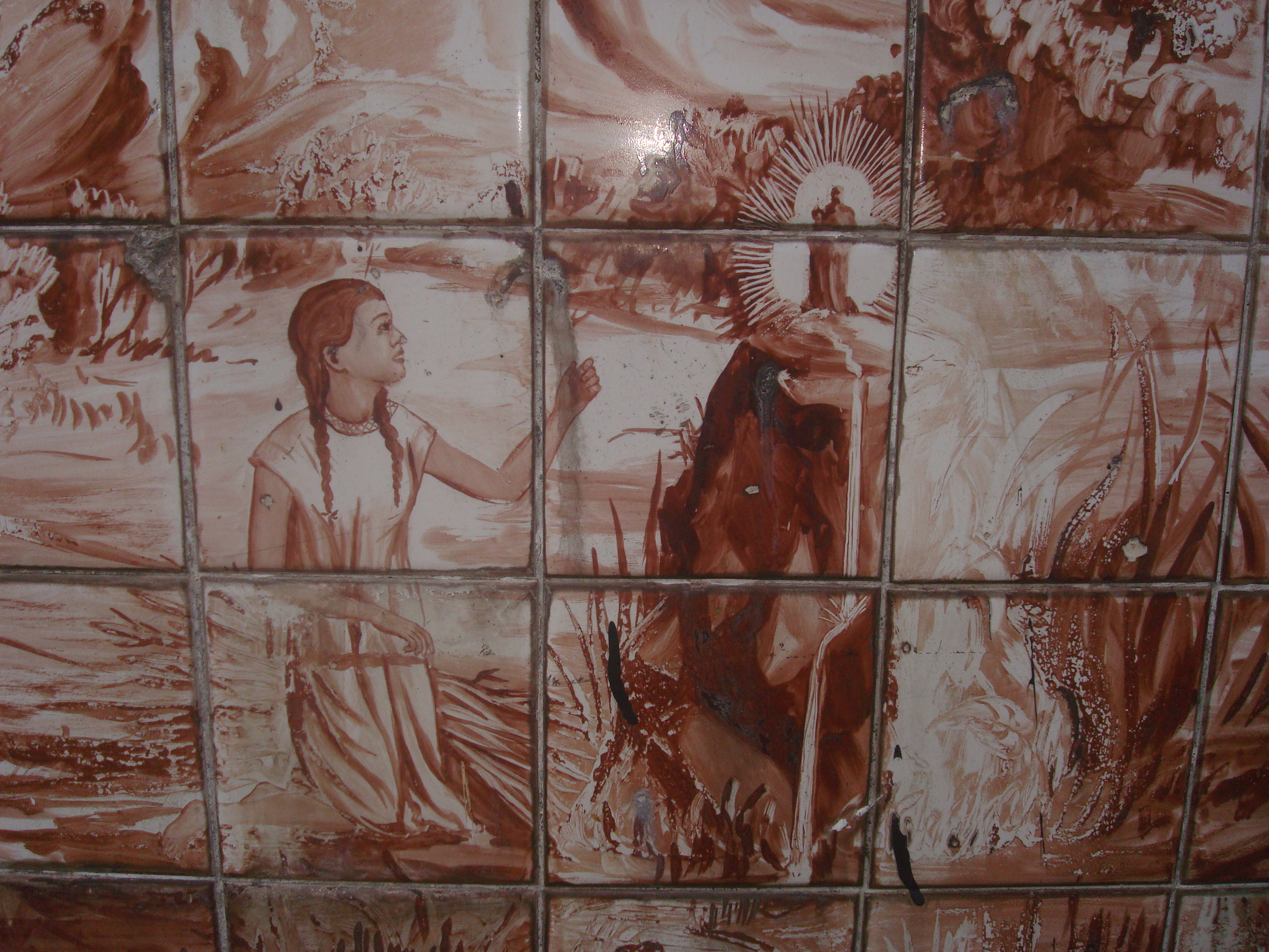 Hallazgo de la imagen de Nuestra Señora de los Ángeles por la mulata Juana Pereira. Mosaico en el Parque España, San José de Costa Rica.